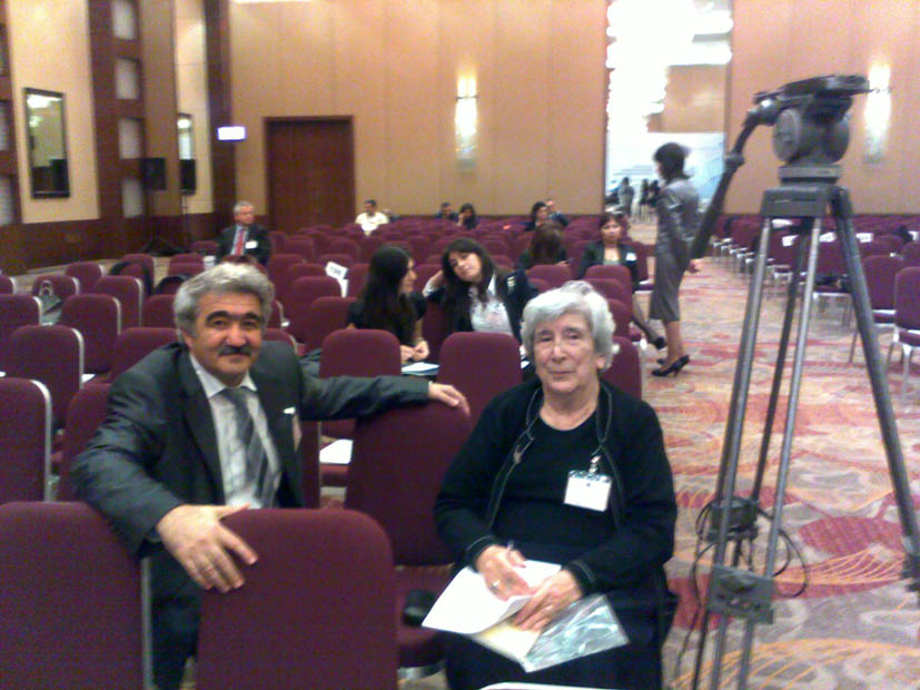 Adil Əsədov Bakı Beynəlxalq Humanitar Forumunda iştirak etmişdir. Adil Əsədov və Zümrüd Quluzadə